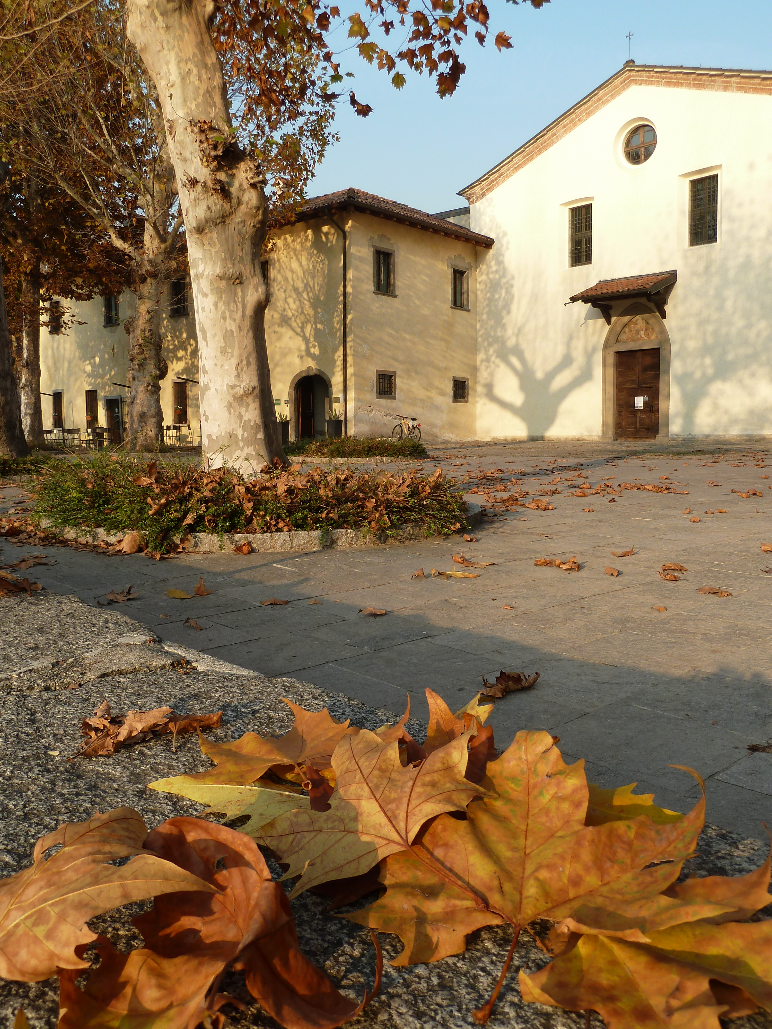 Facciata chiesa attuale